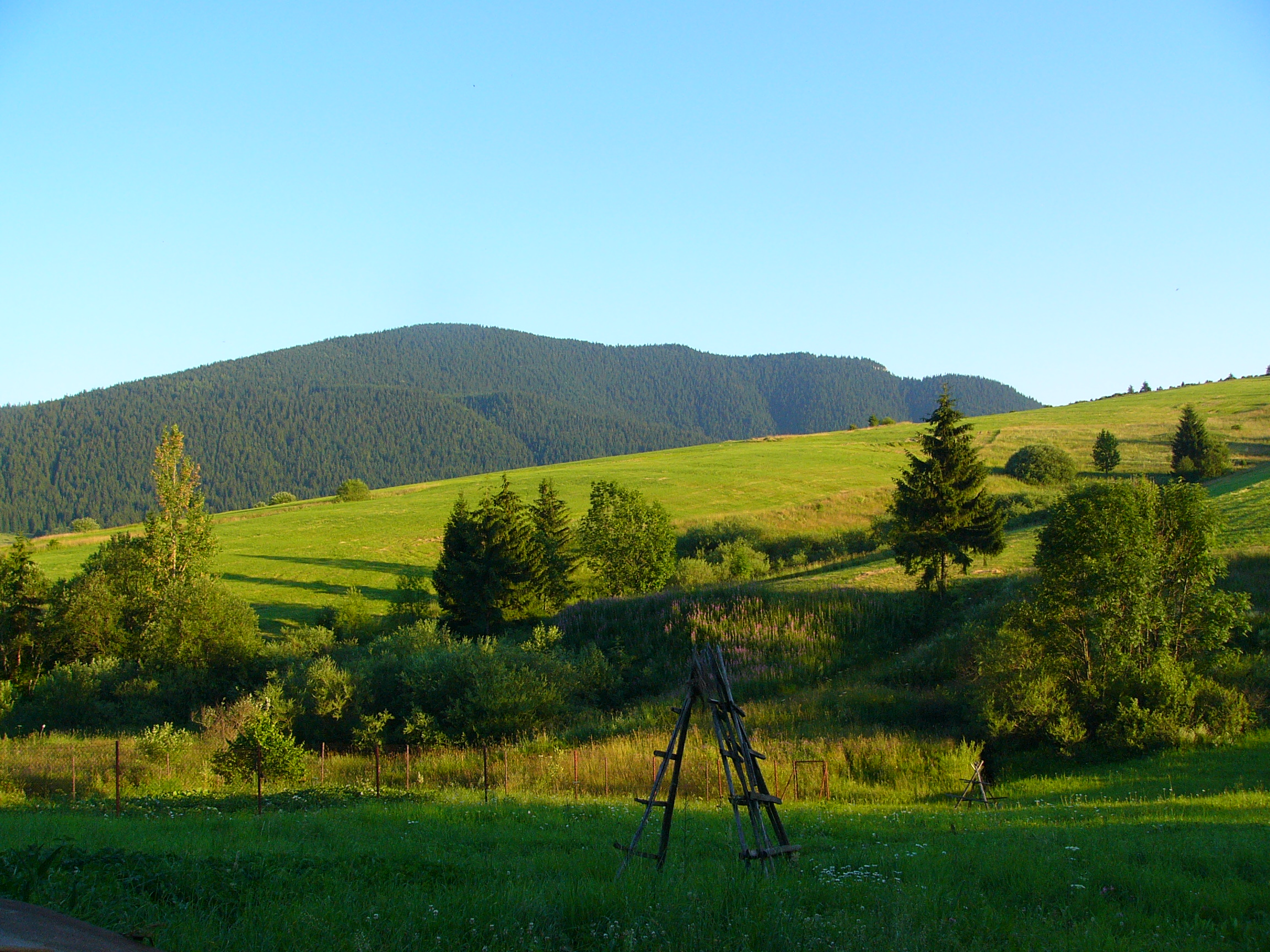 Veľké Borové, leto, pohľad na vrch Prosečné (1 372 m n. m.)